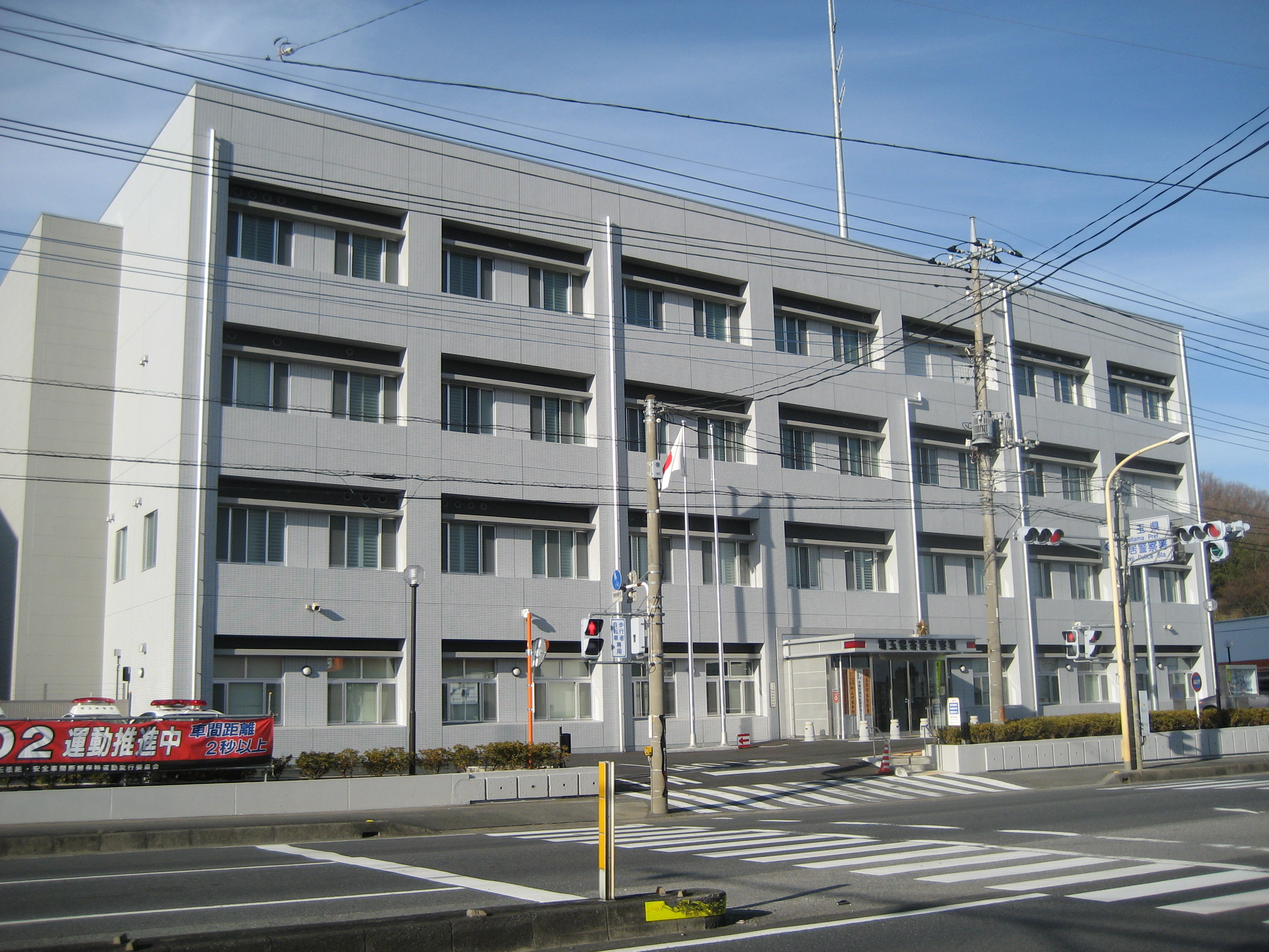 埼玉県寄居警察署庁舎